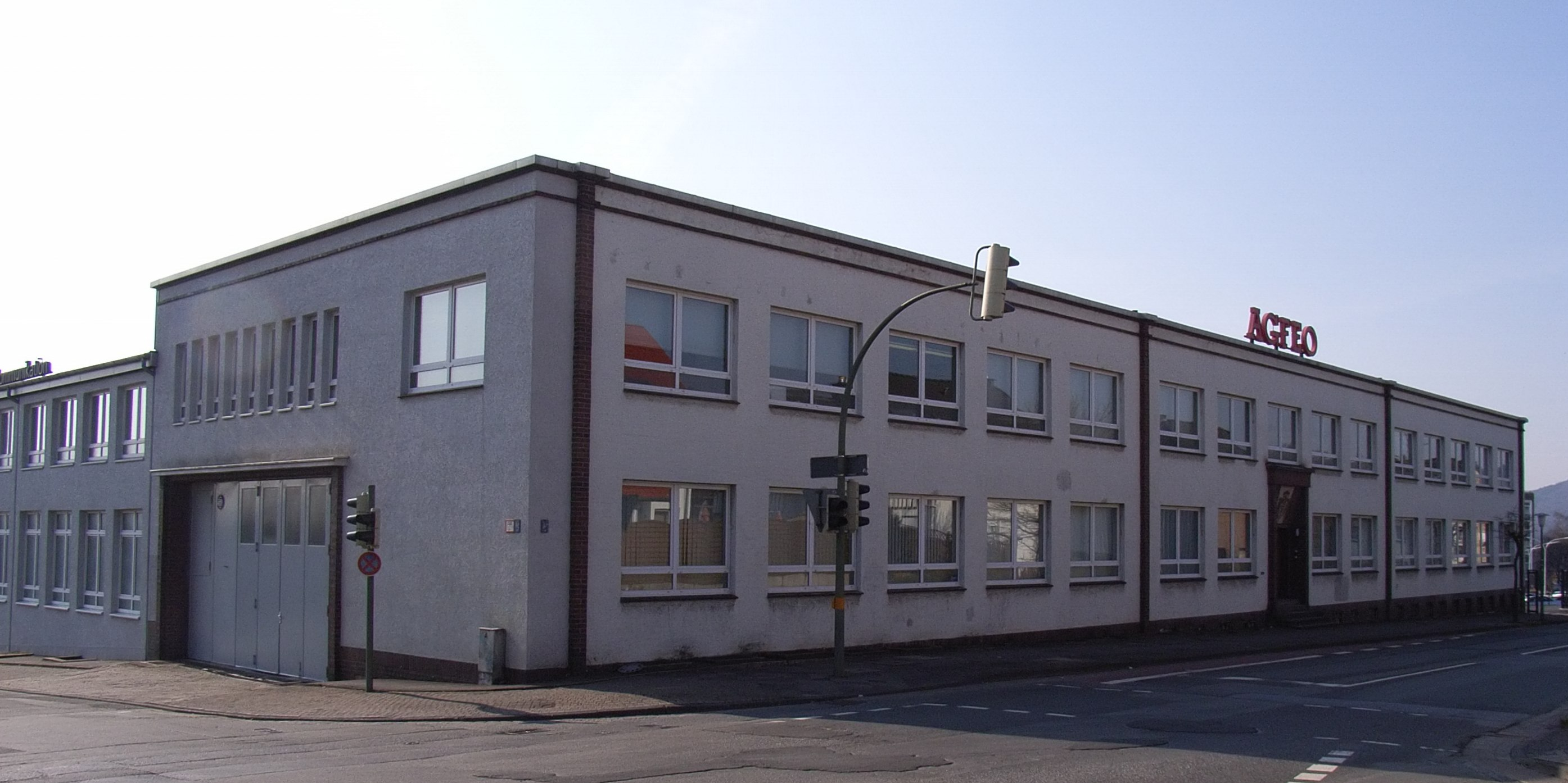 Bielefeld, Deutschland: Agfeo in Brackwede.